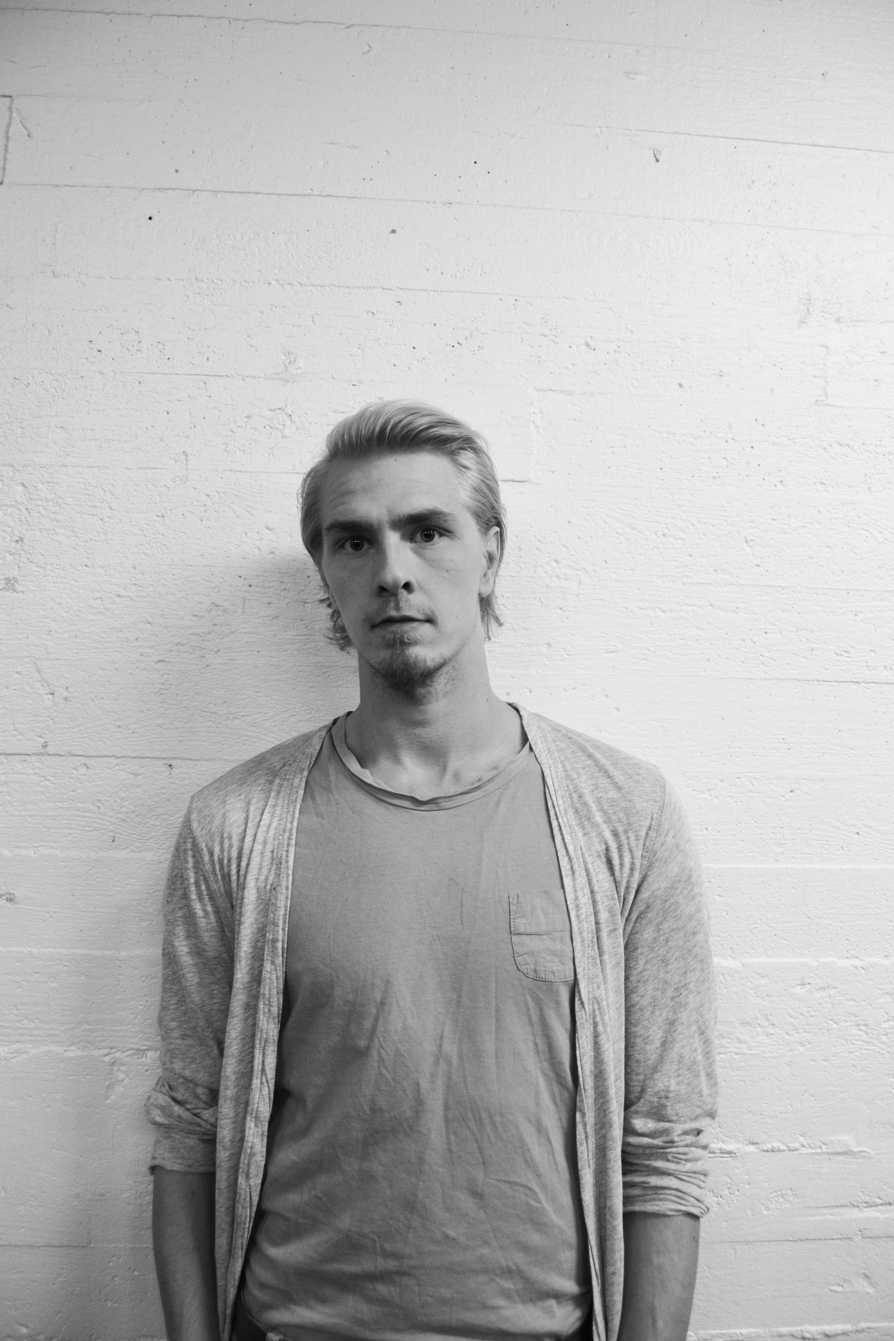 Leo Kirjonen, tanssija / näyttelijä